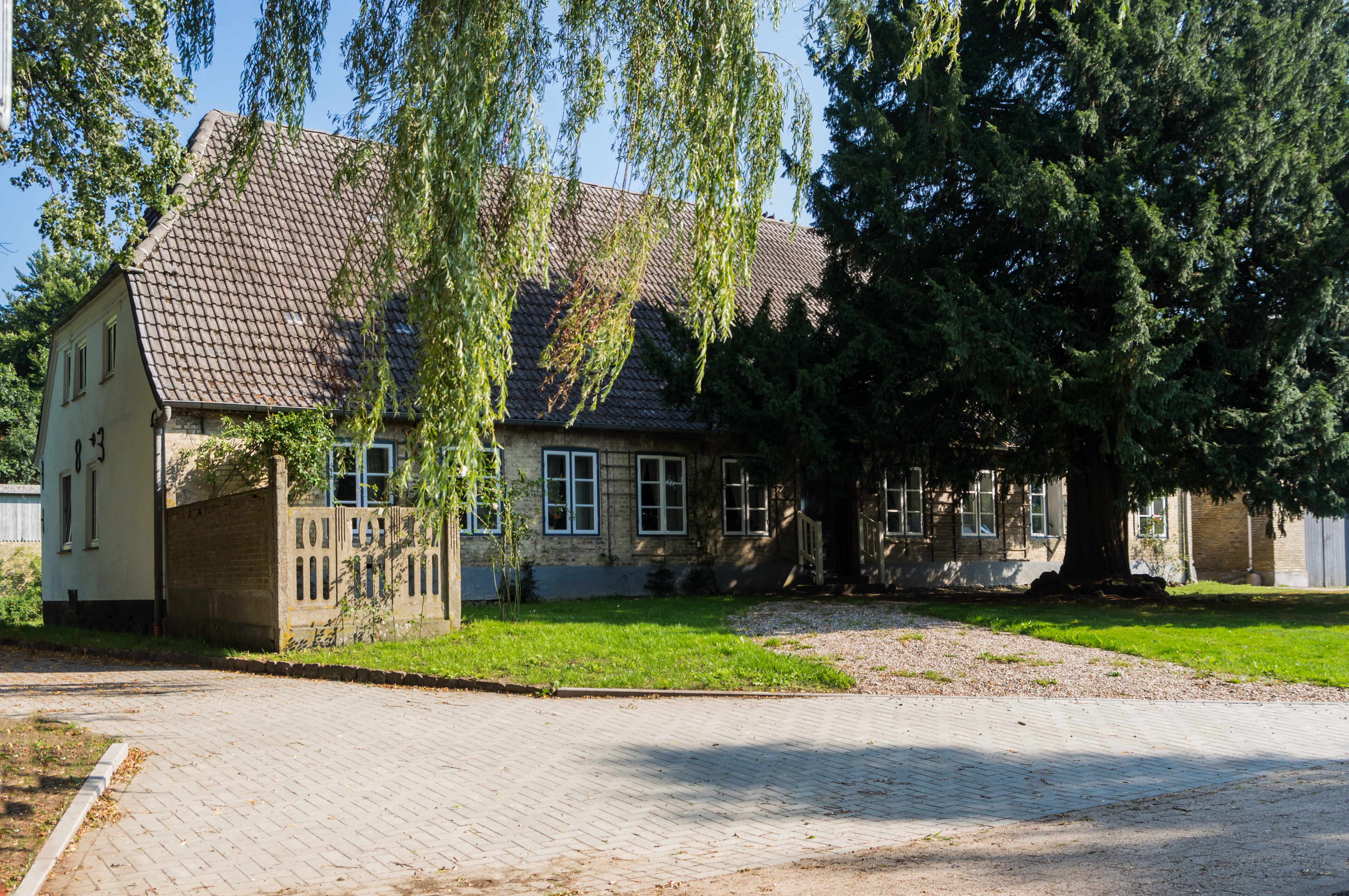 Flensburg-Fruerlund, Alt-Fruerlundhof 1, Wohnhaus, Denkmal-Nr.1